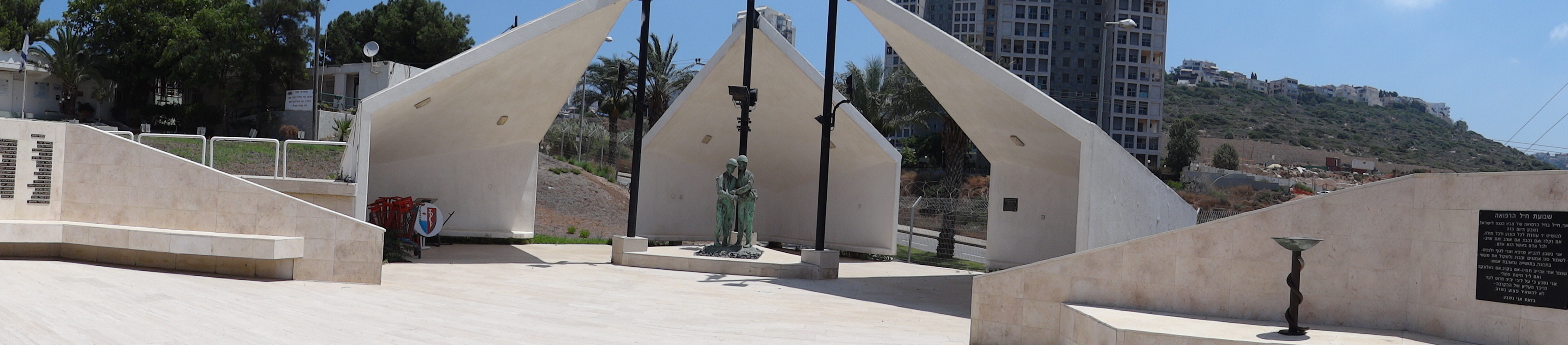 תמונות פנורמיות של אנדרטת חיל הרפואה נמצאת בבסיס מרפ"א צפון בבה"ד 10 בחיפה. האנדרטה היא חלק מאתר ההנצחה המרכזי לחללי חיל הרפואה. סמוך לה חקוקים על קיר הנצחה שמותיהם שלאנשי חיל הרפואה שנפלו מאז מלחמת העצמאות, רופאים, חובשים, פרמדיקים ובעלי מקצועות ותפקידים נוספים בחיל הרפואה.